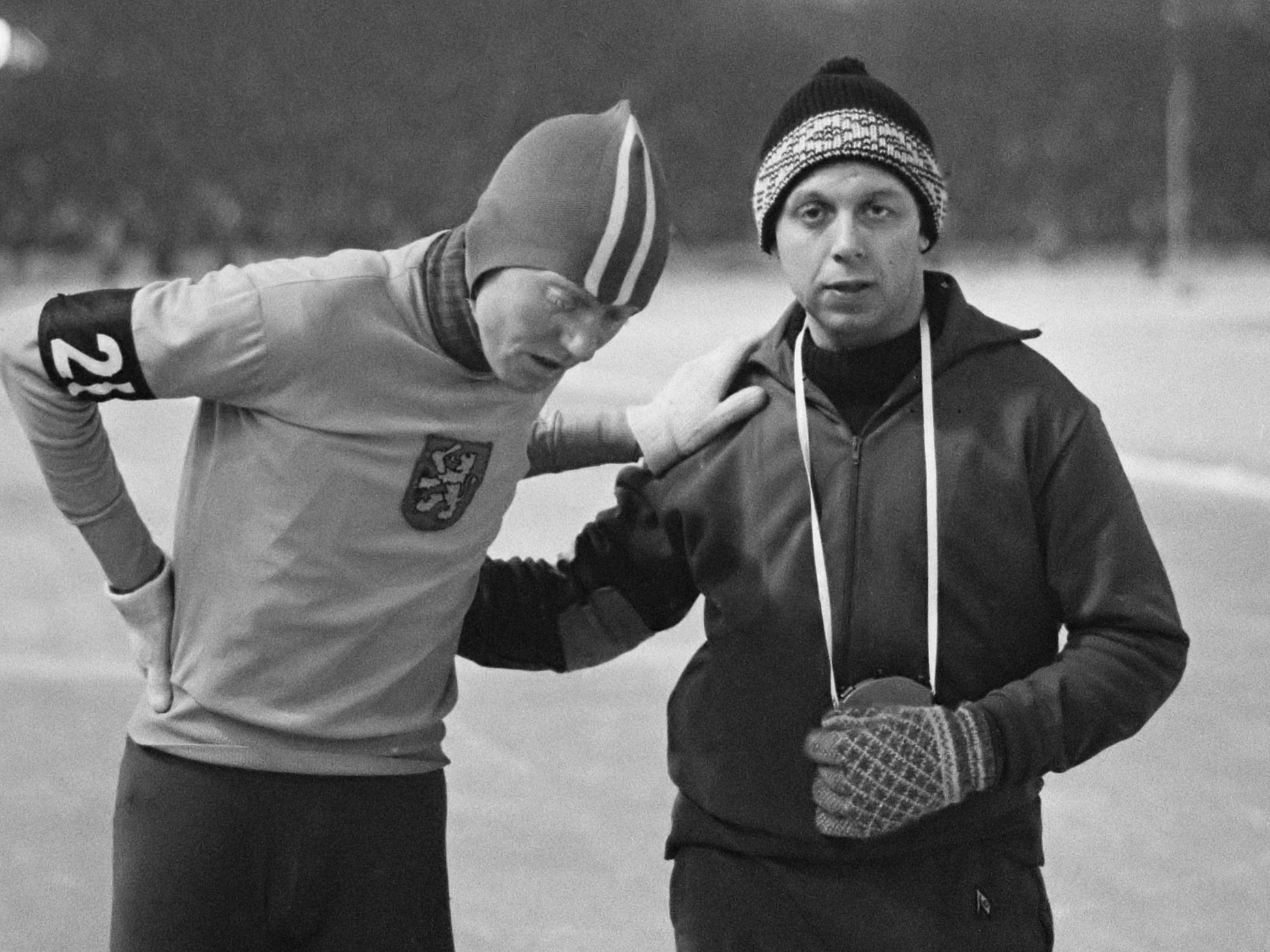 Wereldkampioenschappen schaatsen heren allround in Oslo. Coach Wim de Graaff vangt Peter Nottet op na diens rit op de 5000 meter. 12 februari 1967